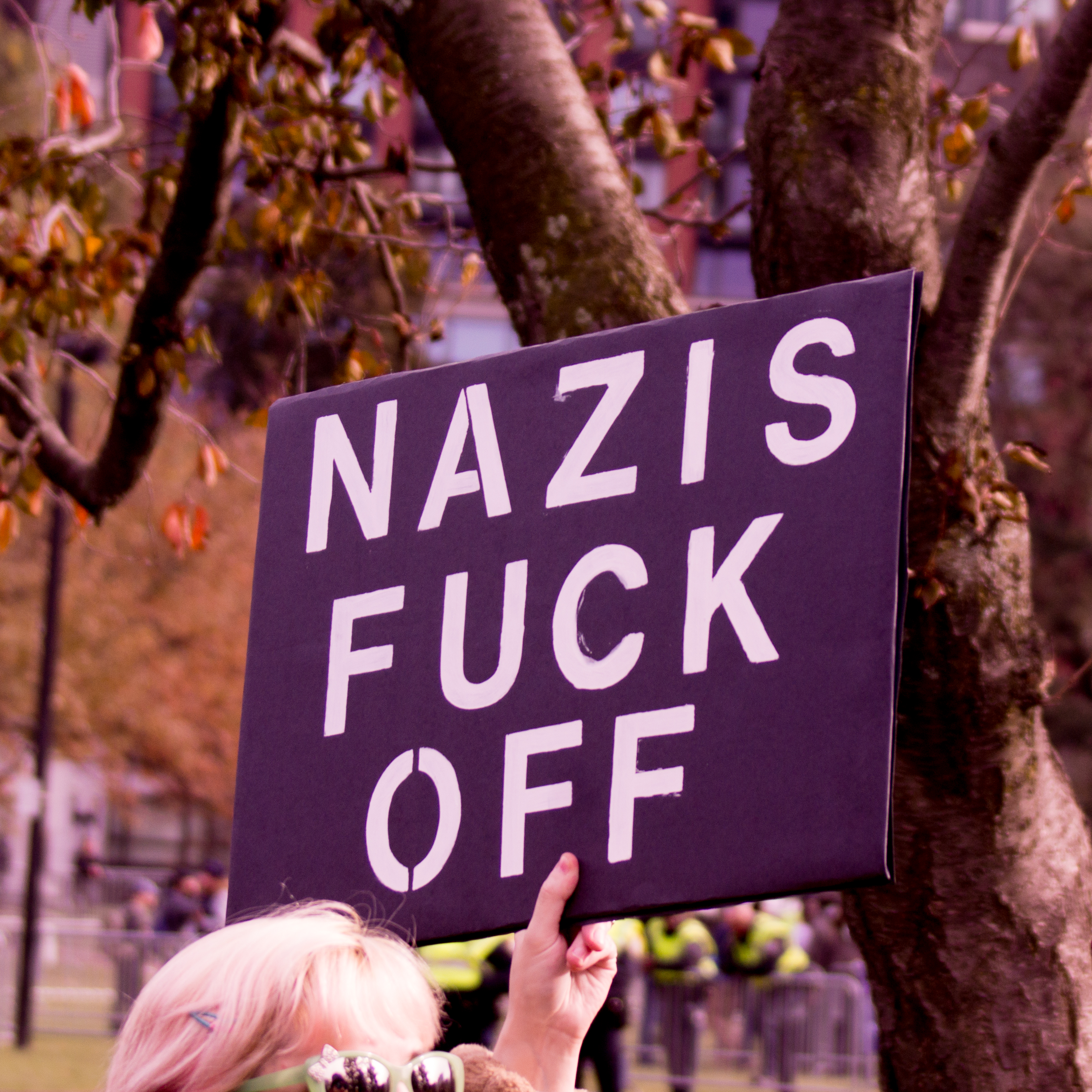 20171118-DSC03147